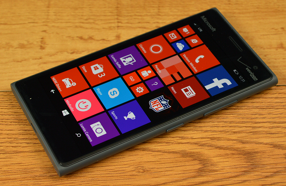 Este es el Microsoft Lumia 735, conocido como el Lumia Selfie.